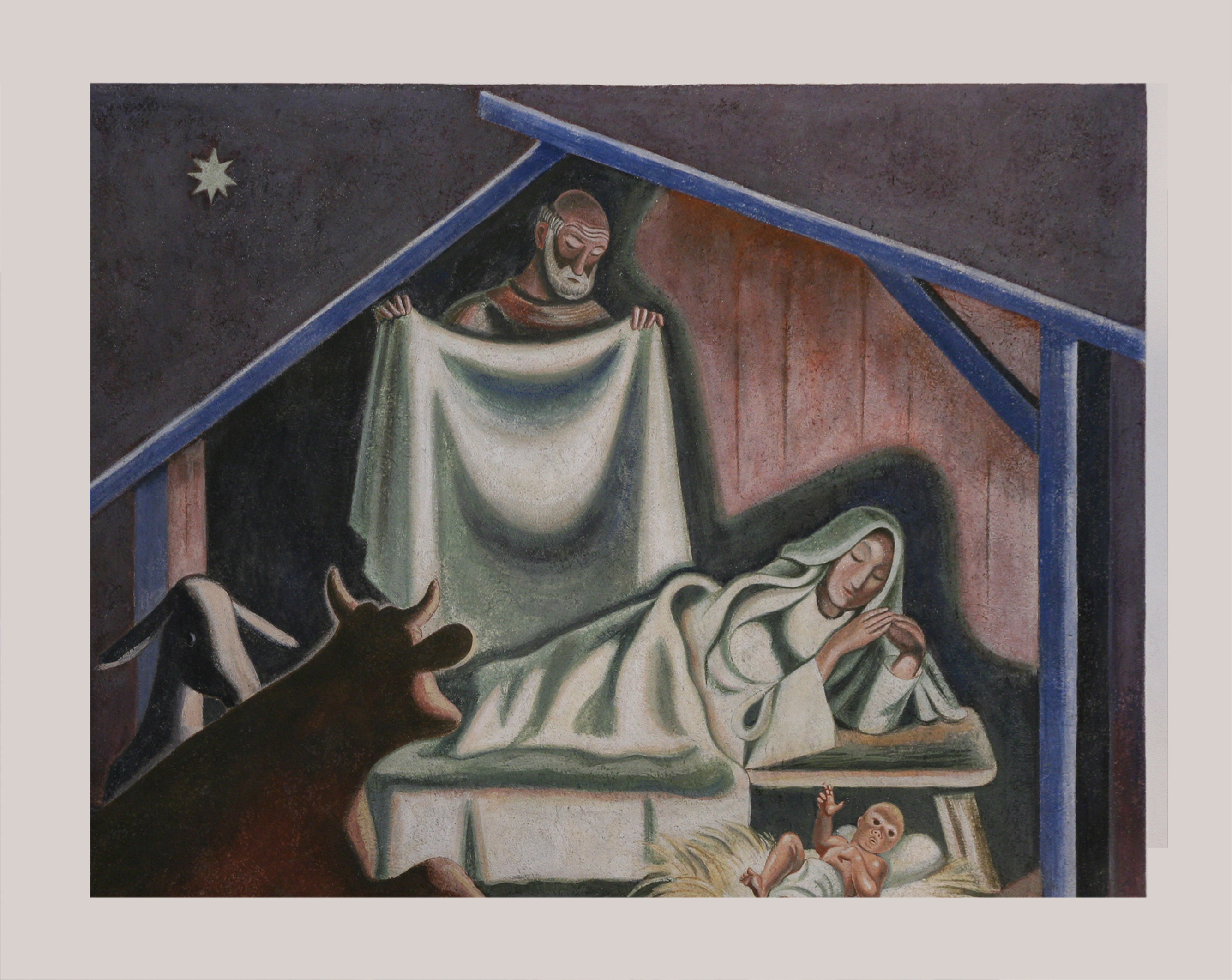 Römisch-katholische Pfarrkirche St. Theresia Zürich-Friesenberg, Fresko von Richard Seewald